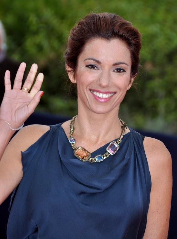 Aure Atika au festival du cinéma américain de Deauville